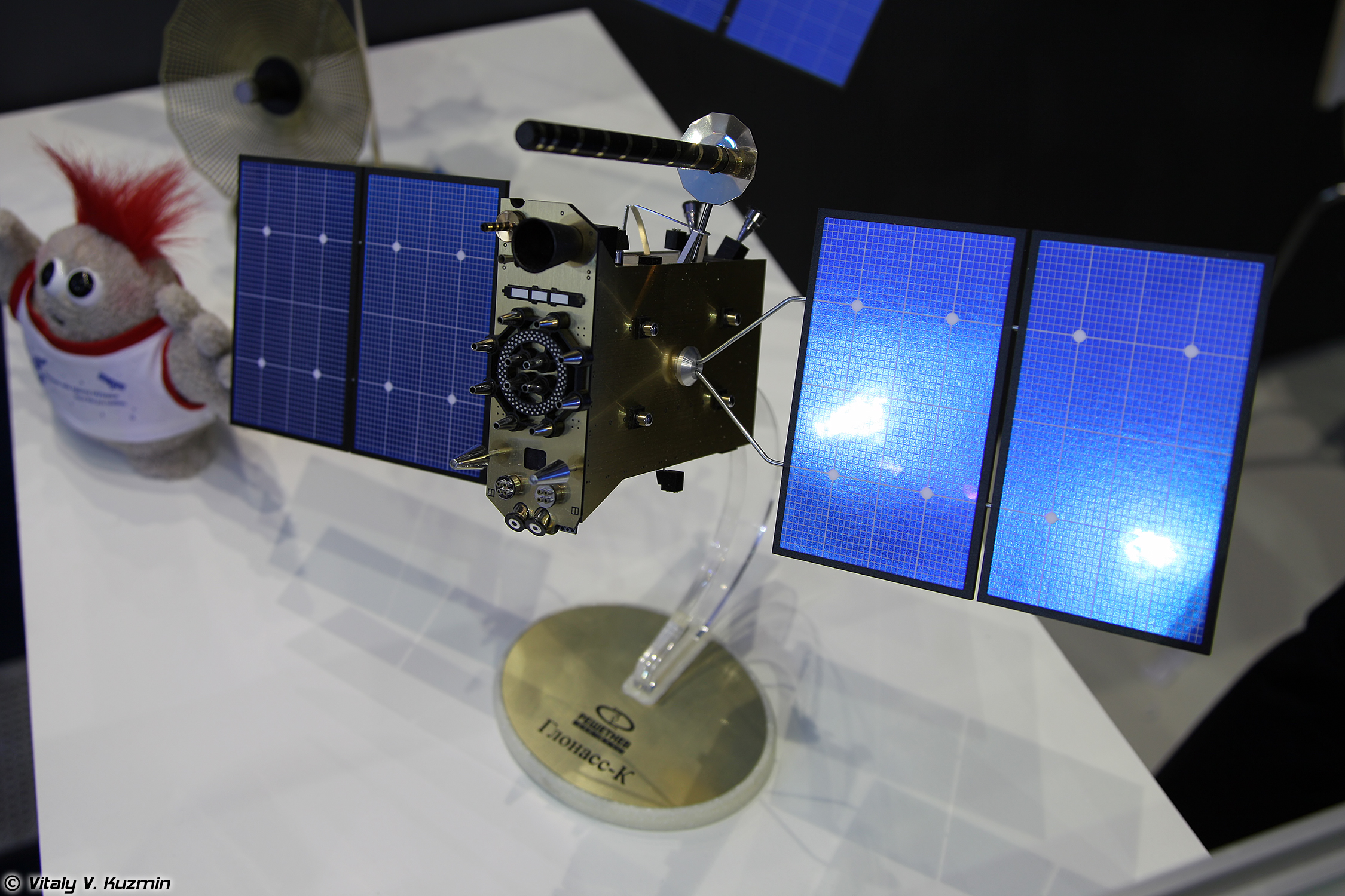 Космический аппарат Глонасс-К (справа) (Glonass-K satellite (on the right)